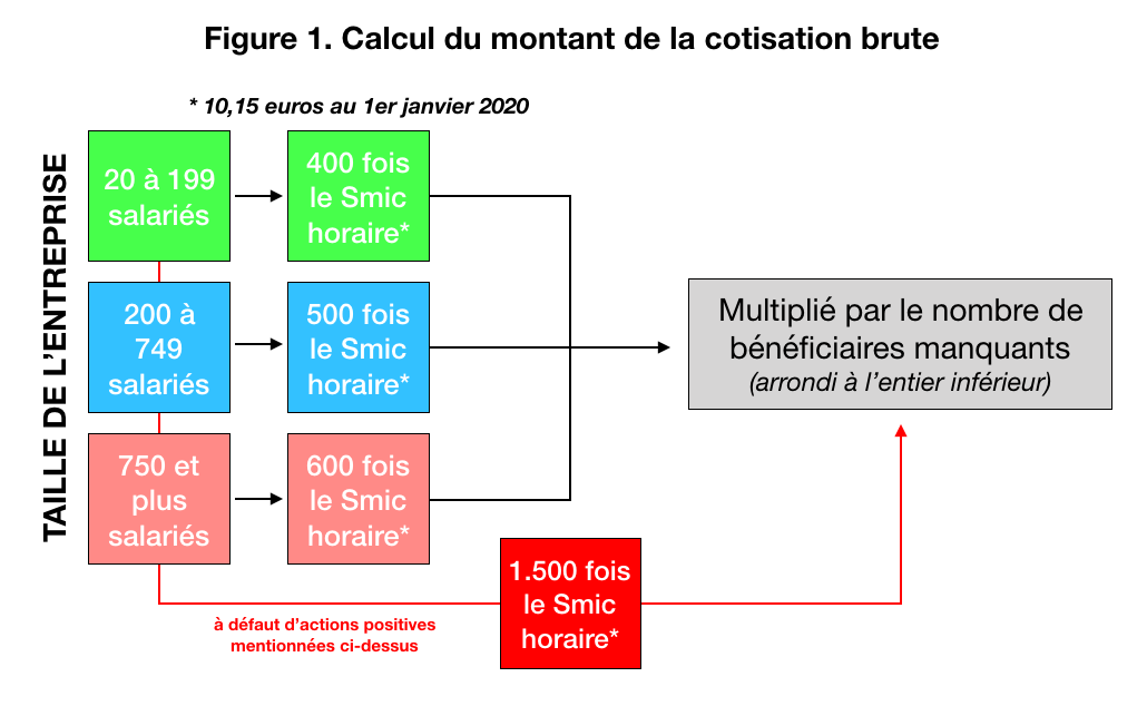 Vulgarisation du nouveau mode de calcul de la cotisation "brute" dans le cadre de l'Obligation d'Emploi des Travailleurs Handicapés (OETH) en France.